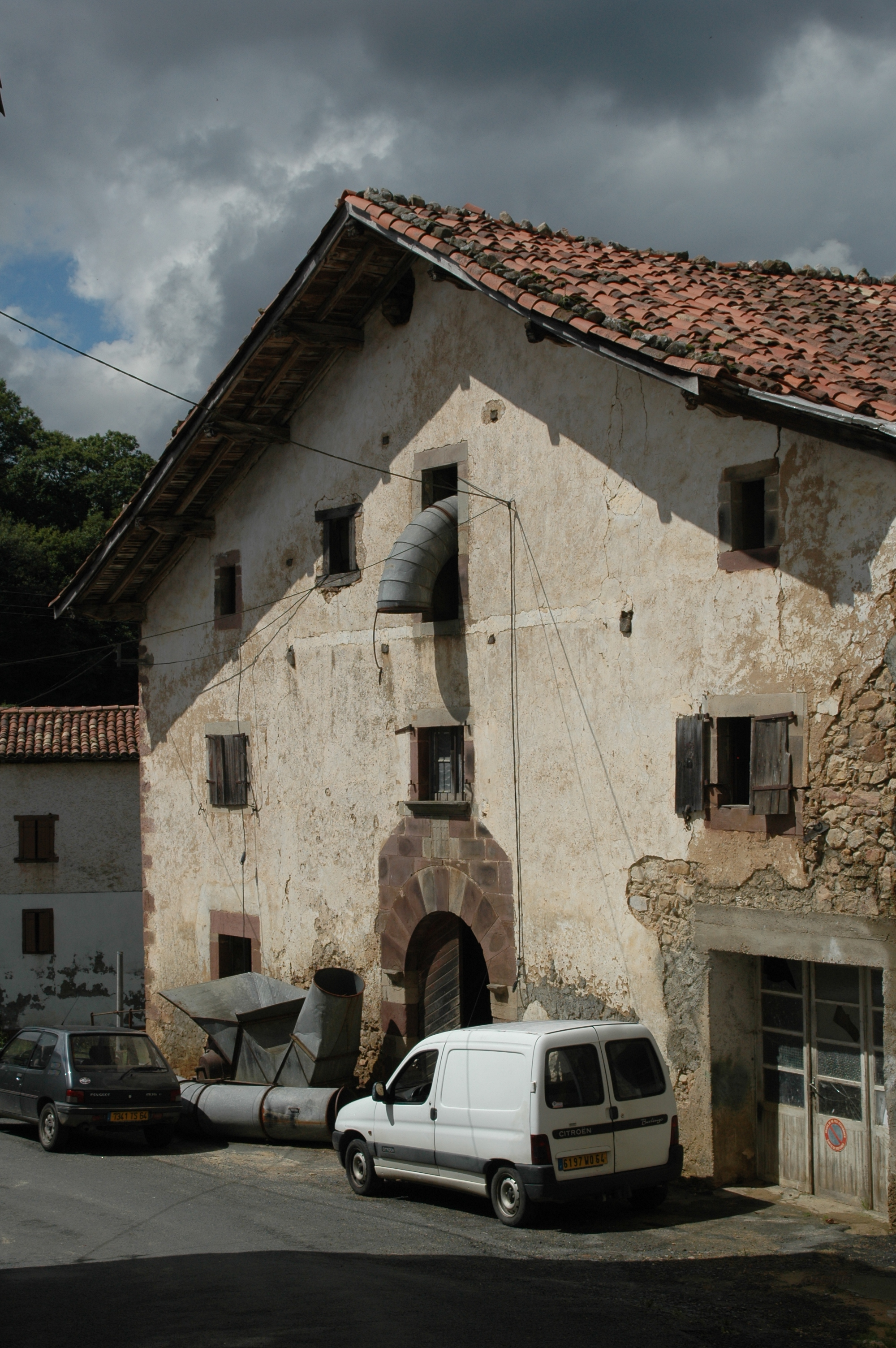 Urepel, vieille ferme basse-navarraise